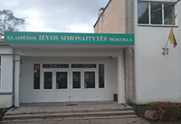 Klaipėdos Ievos Simonaitytės mokyklos pastatas nuo 2012 m.